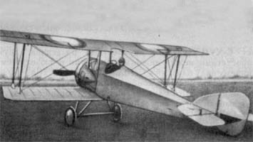 Сікорський С.XX на аеродромі